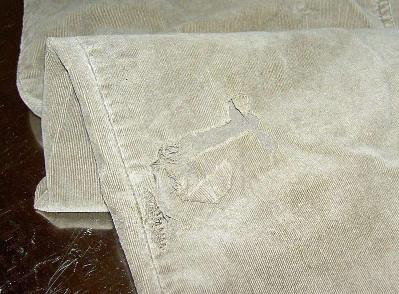 Eine durch eine Beissattacke eines Hundes zerfetzte Hose, auf der der Speichel des Hundes sichergestellt wurde. Asserviertes Beweisstück eines (abgeschlossenen) deutschen Kriminalfalles. Eigene Aufnahme.